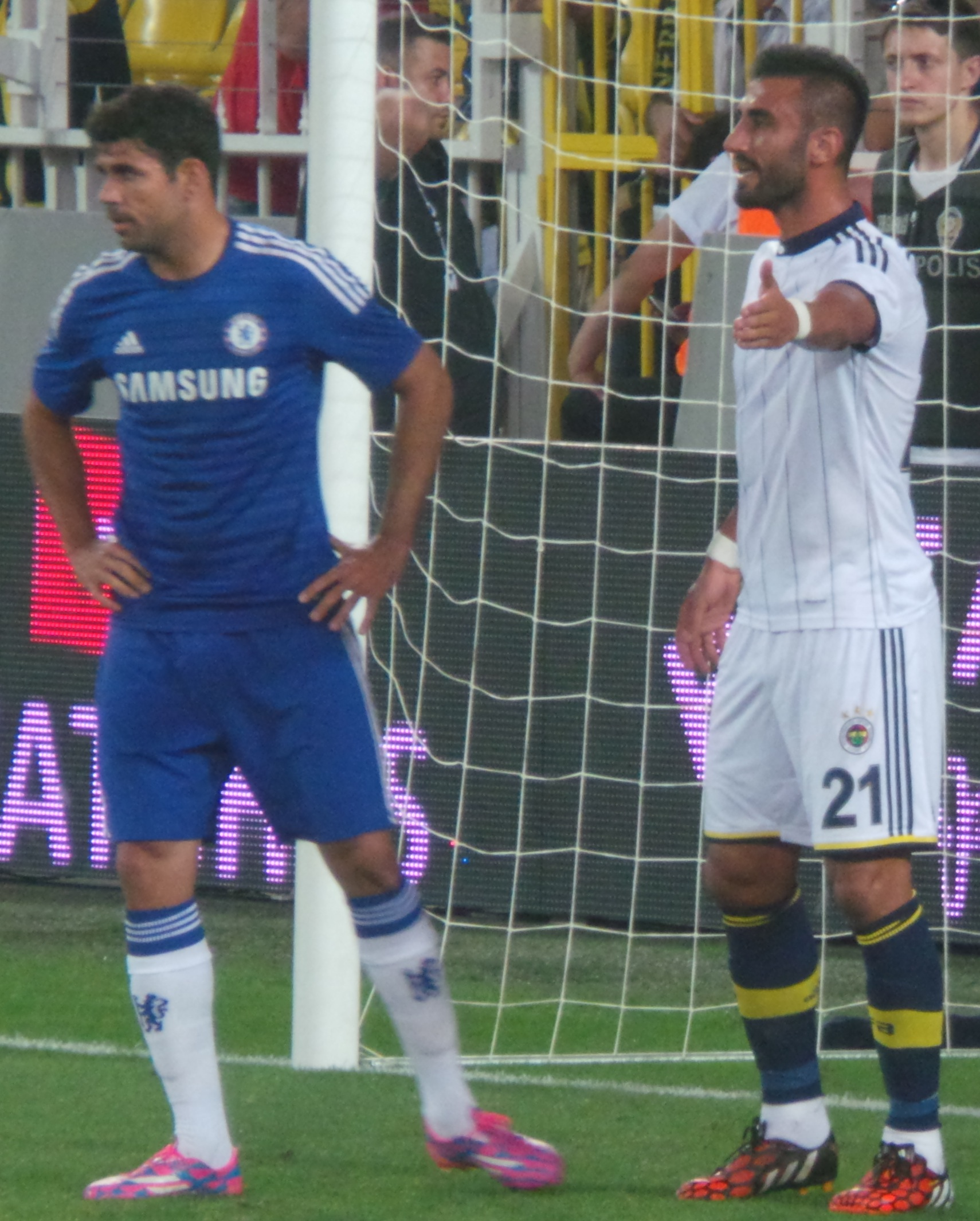 Selçuk Şahin & Diego Costa